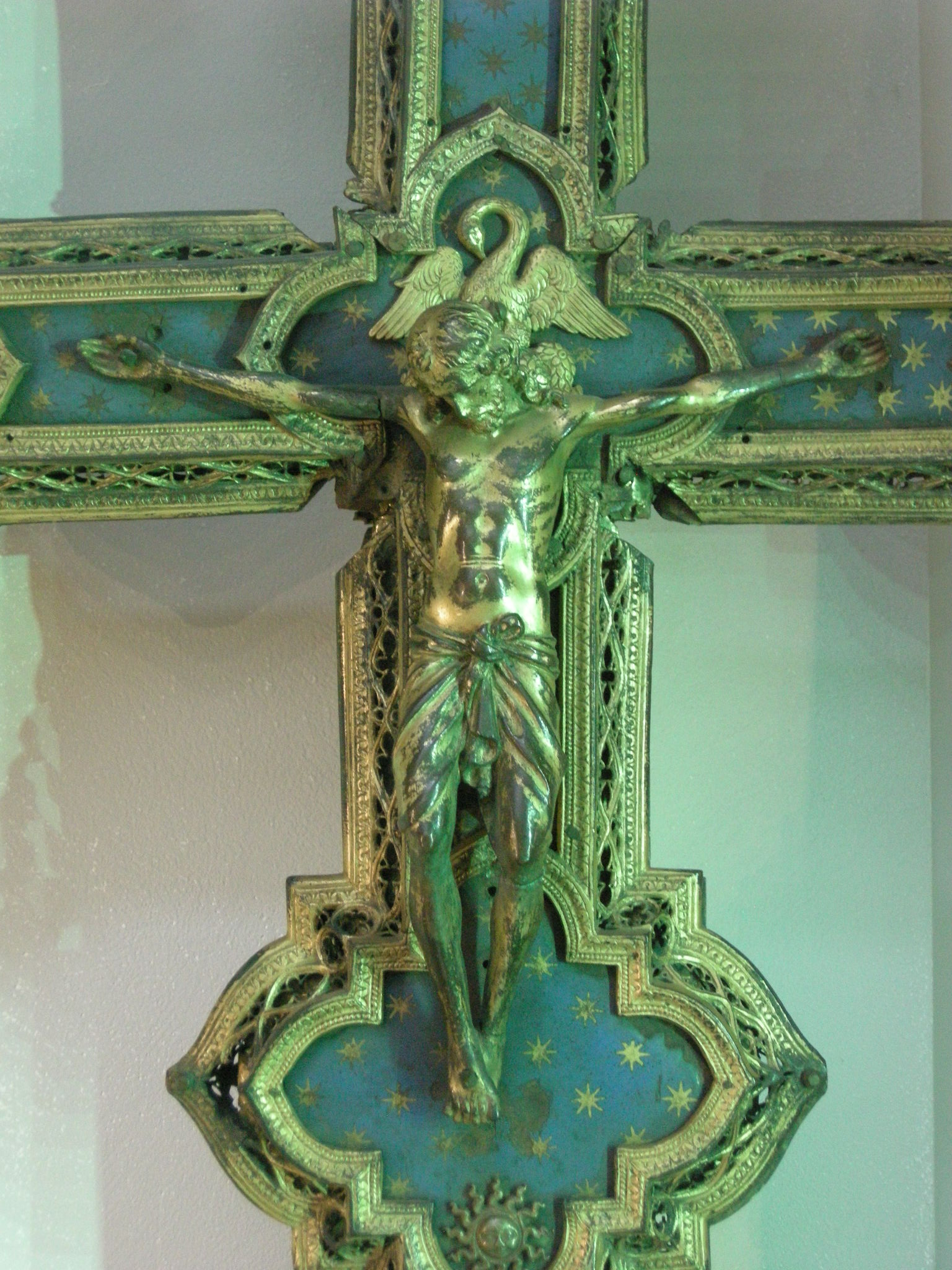 Luca della robbia e aiuti, croce processionale, 1470 circa